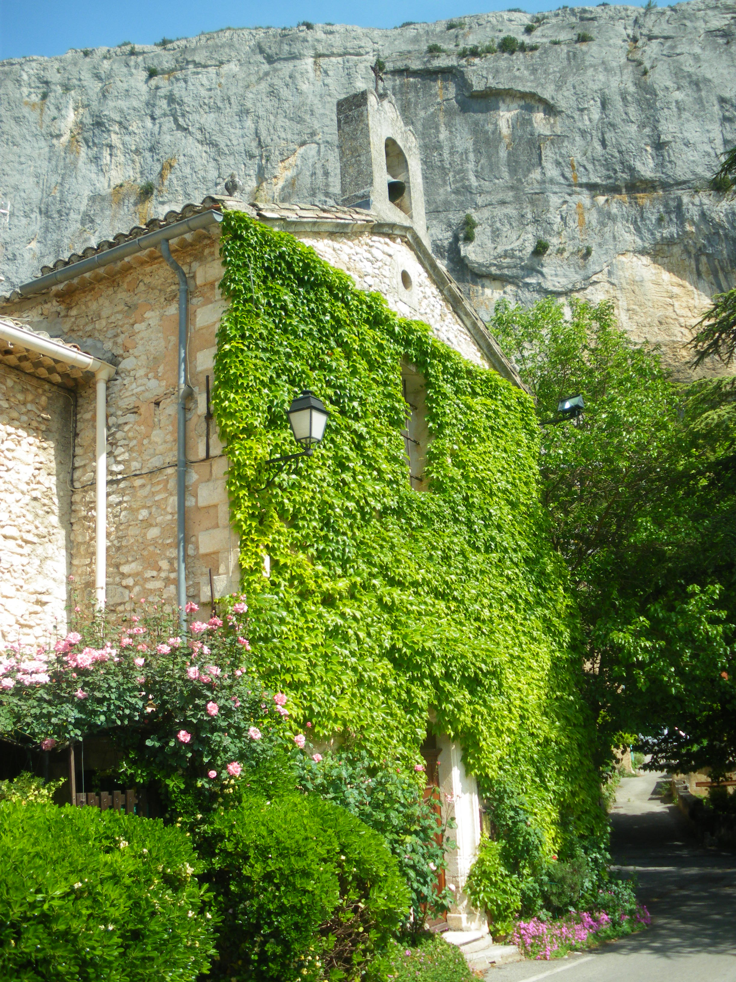 église de Lioux, Vaucluse